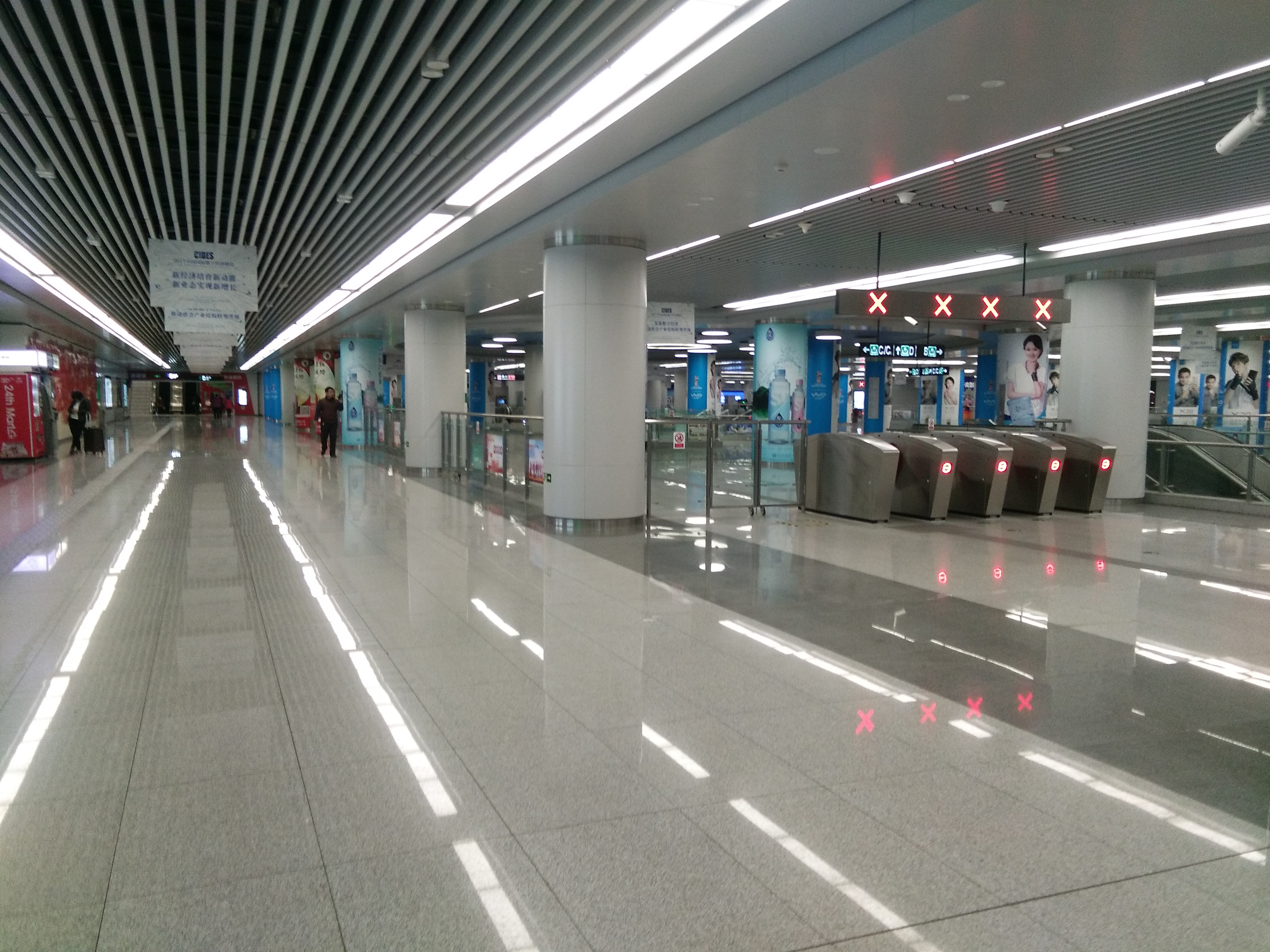 中文（中国大陆）: 石家庄地铁一号线地下